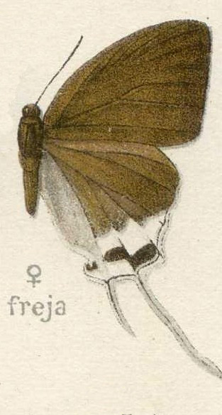 Cheritra freja, Lycaenidae